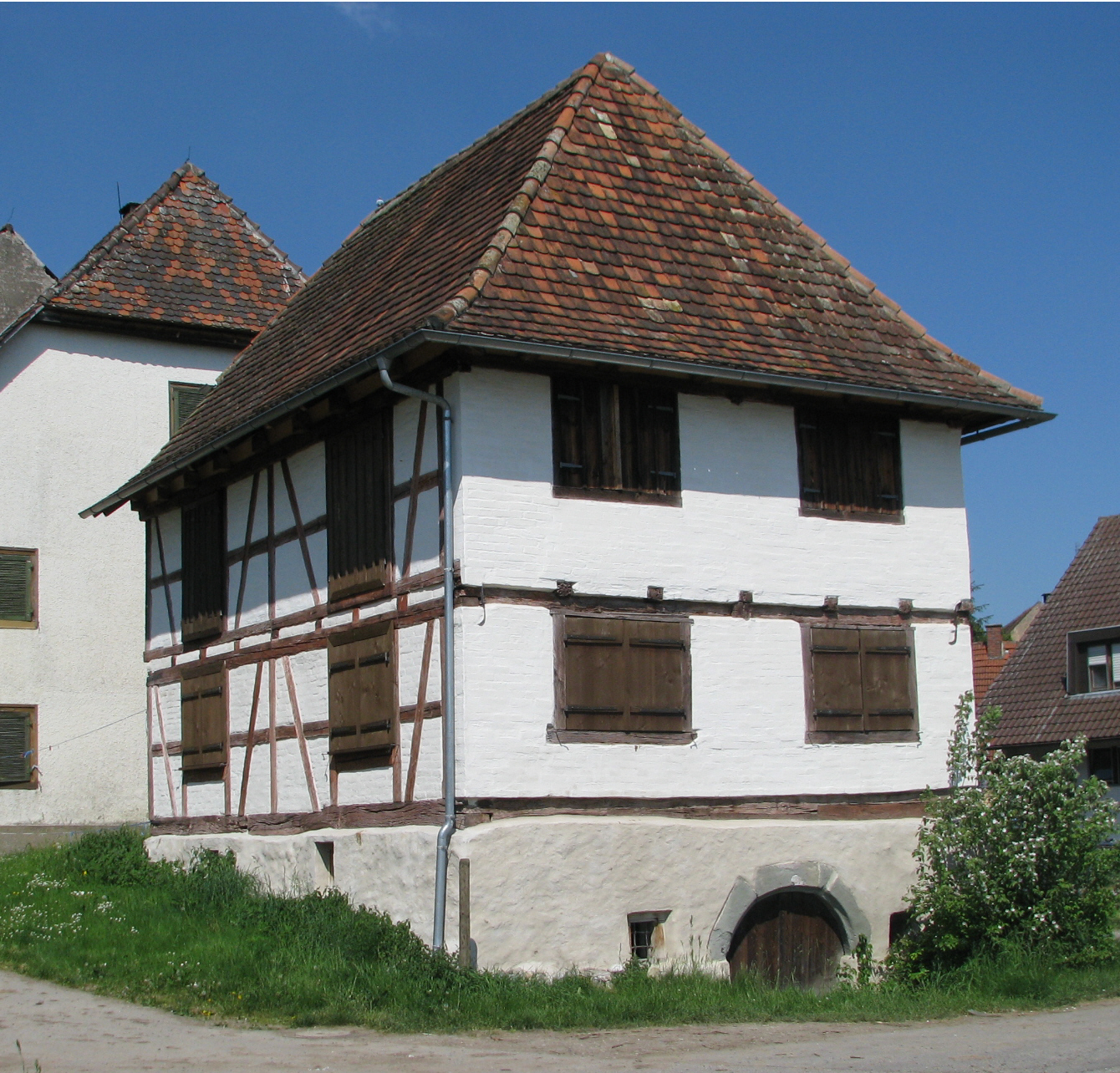 Zweistöckiger Speicher in Friedrichshafen-Schnetzenhausen, Jahreszahl 1616 an der Tür/Storehouse near Friedrichshafen, dated 1616